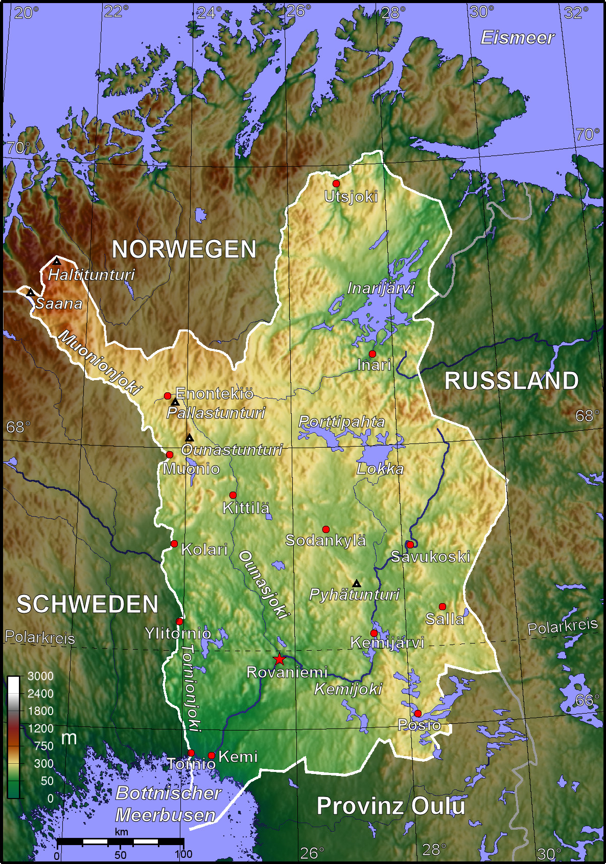 Topografische Karte der finnischen Provinz Lappland (deutschsprachige Version)